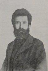 Anastas Lozanchev